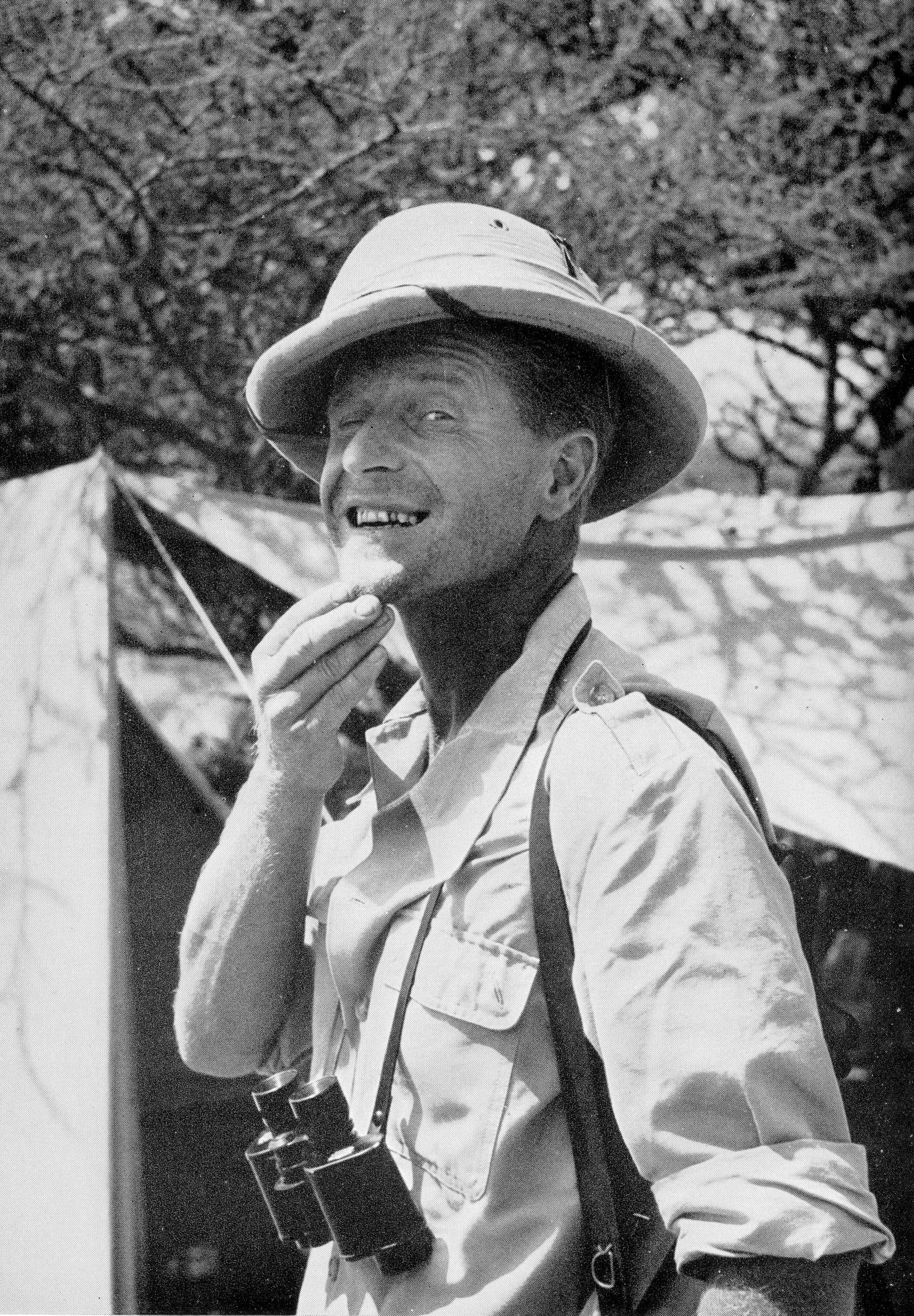 Herbert Rittlinger 1954 in Äthiopien/Tana-See/Blauer Nil